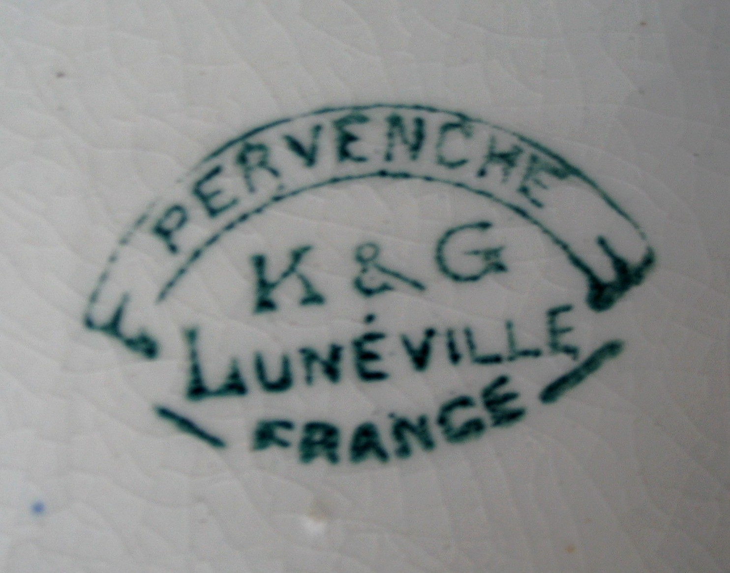 Cachet Luneville début XXe siècle, modèle pervenche